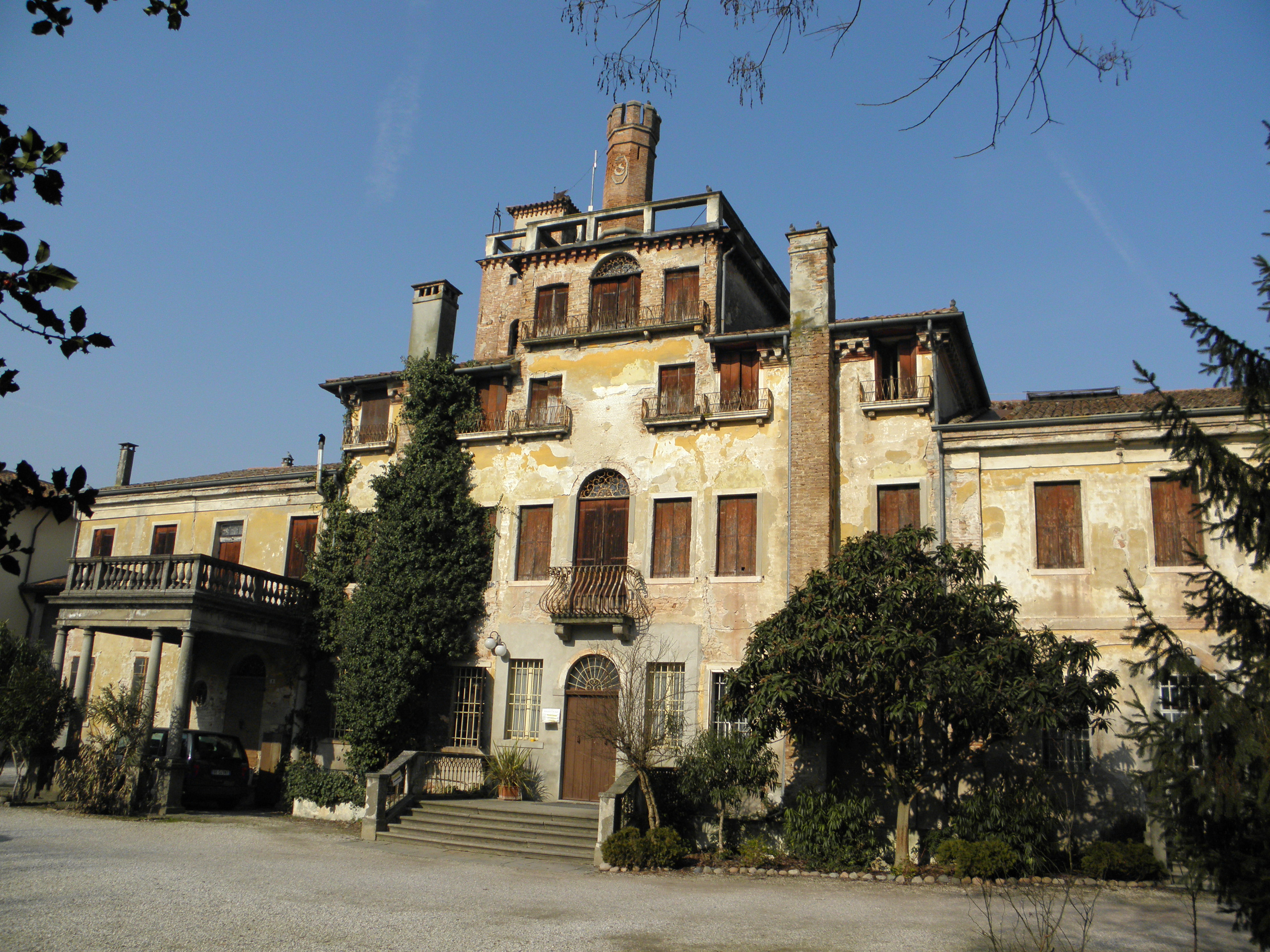 Villa Centanini, Stanghella: vista anteriore.